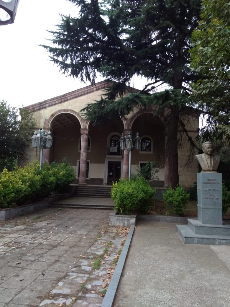 Qaçağan Mədəniyyət evi